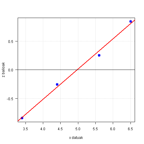 Probabilitate normaleko grafikoa: Henryren zuzena.